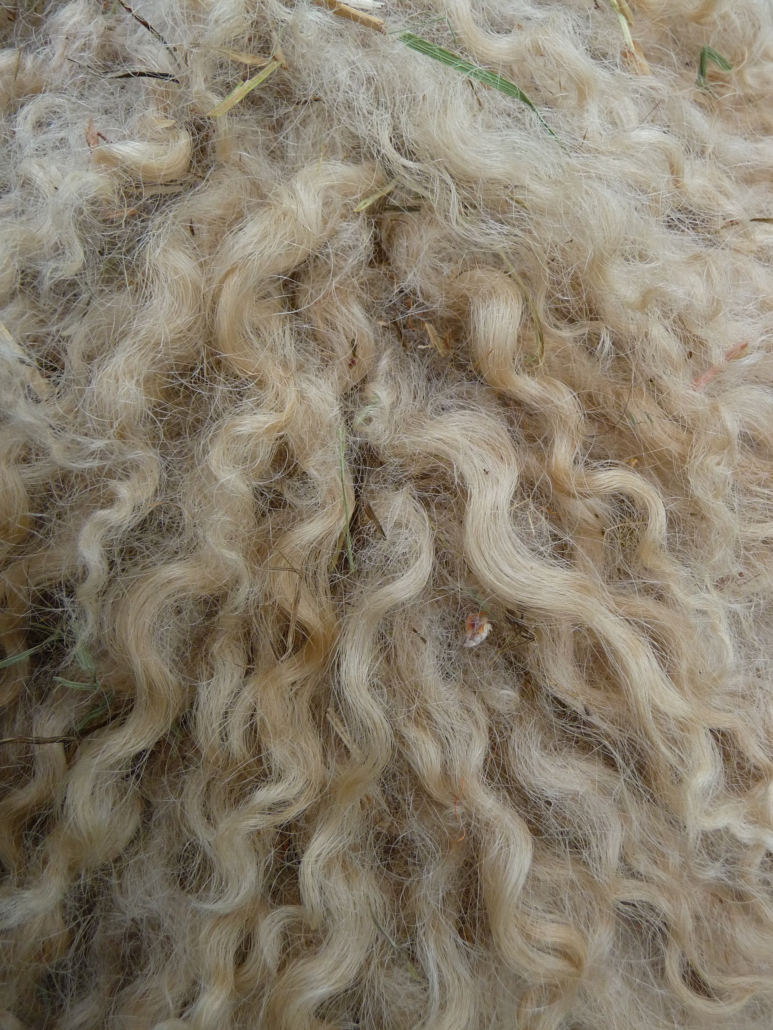 Detailaufnahme des Fells / der Wolle eines Walliser Schwarznasenschafs